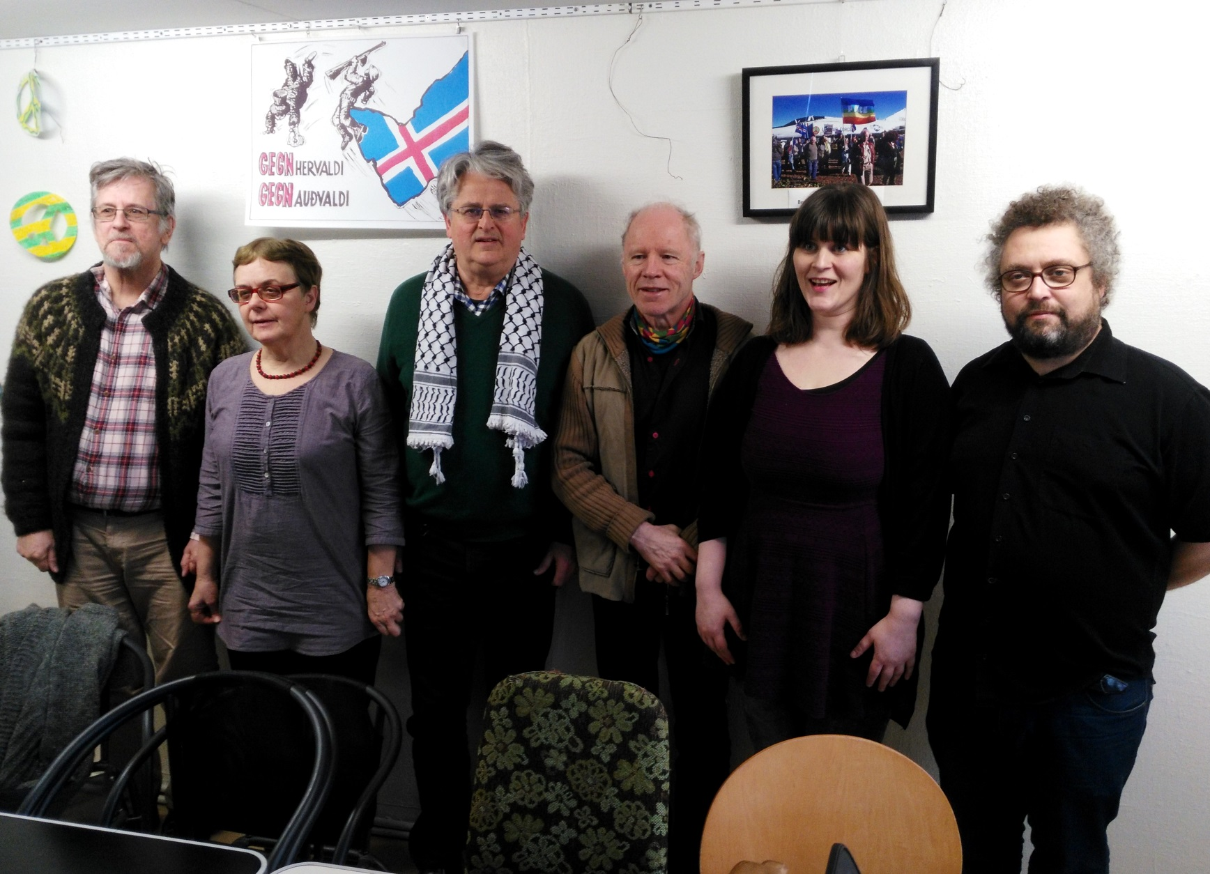 Fimm formenn SHA. Erling Ólafsson, Ingibjörg Haraldsdóttir,Sveinn Rúnar Hauksson, Árni Hjartarson, Auður Lilja Erlingsdóttir og Stefán Pálsson